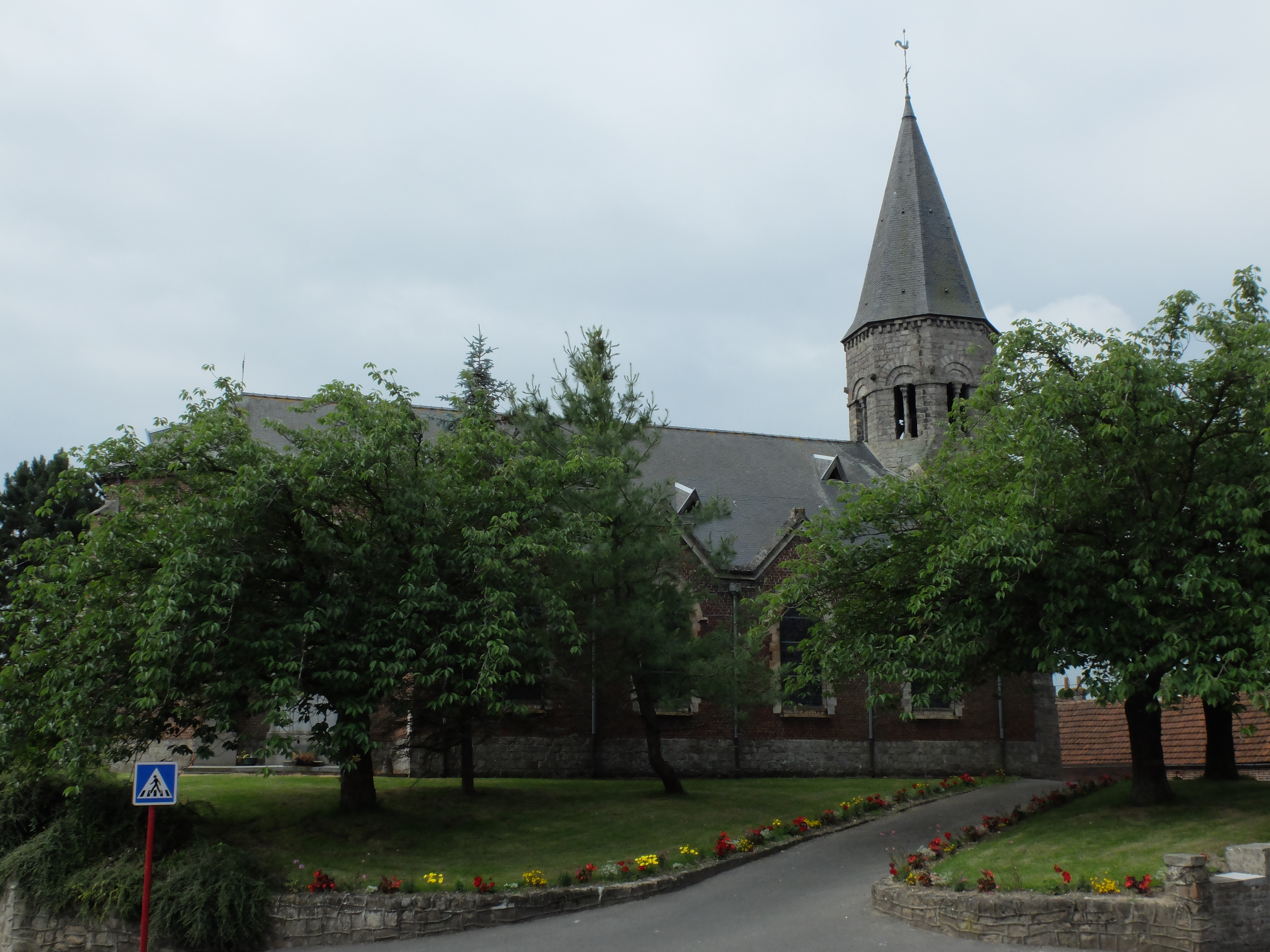 Vue de l'église Saint-Léger de Saudemont.